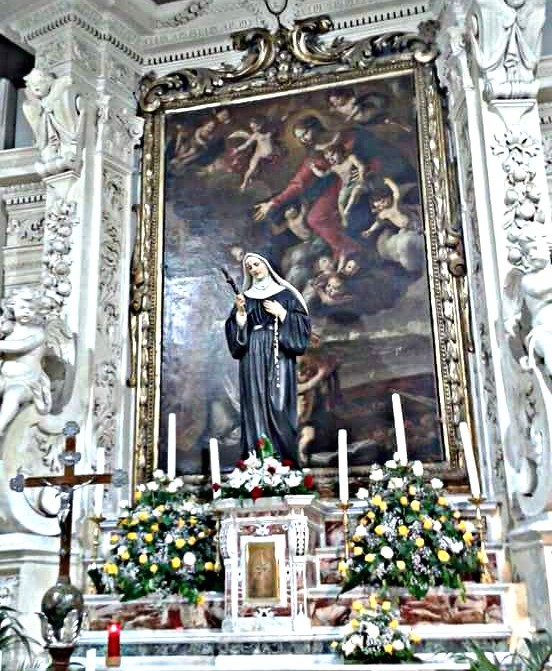 altare santa rita